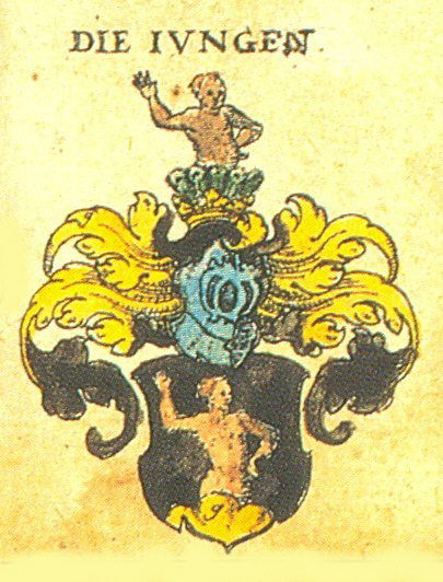 Stammwappen der Augsburger Patrizierfamilie Jungen